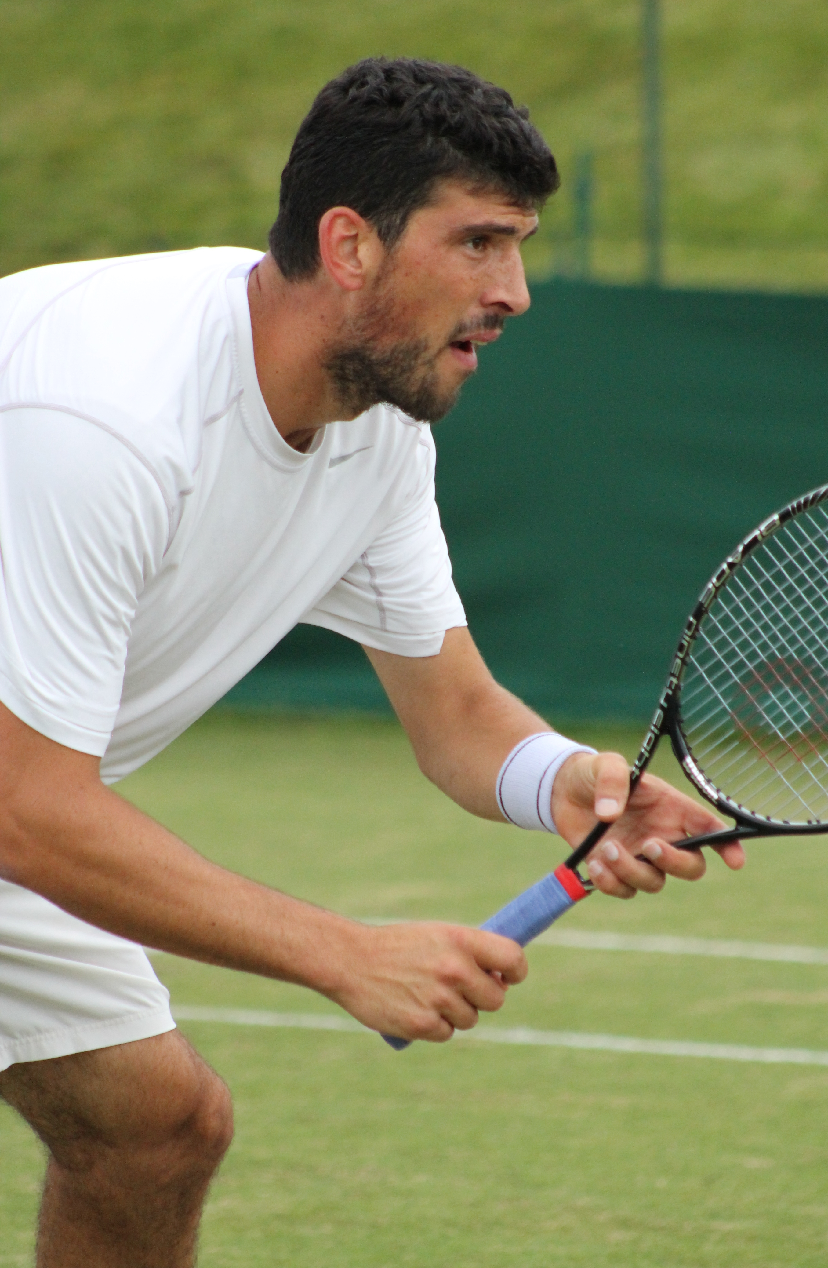 Skugor WMQ14 (6)